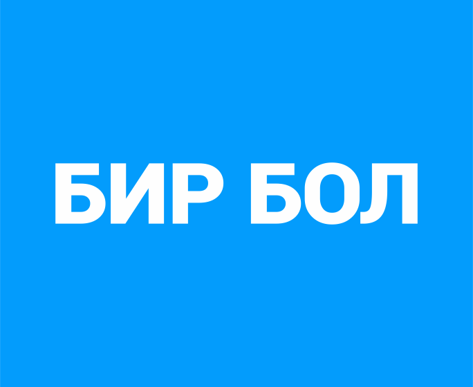 Logo of kyrgyz political party "BIR BOL"